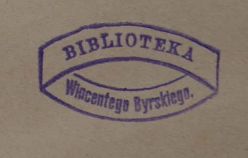 Pieczęć, którą Wincenty Byrski oznaczał książki, należące do swojej biblioteki.